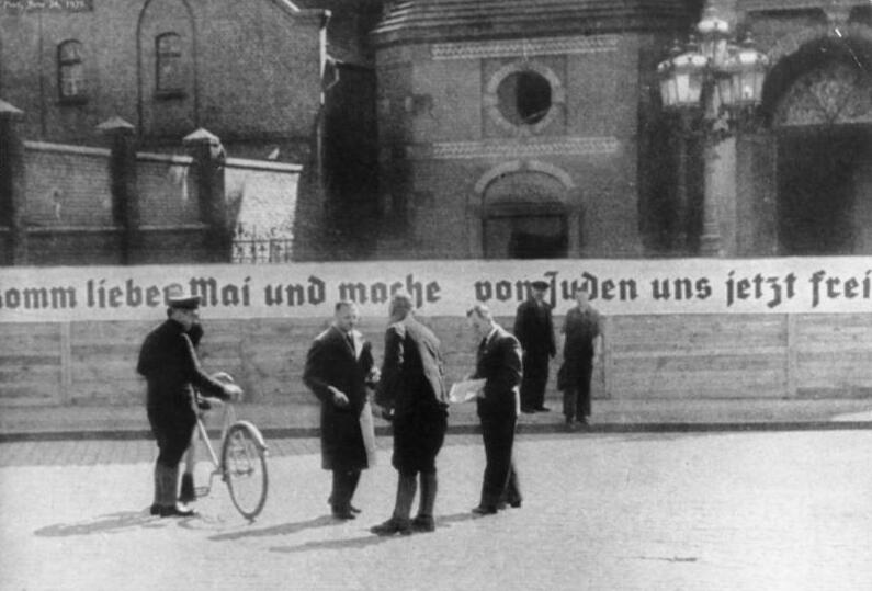 Zentralbild Von der Nazipartei organisierter Judenboykott am 1. April 1933 in ganz Deutschland. Vor den jüdischen Geschäften stehen SA- und SS-Posten, die die Bevölkerung auffordern, nicht bei Juden zu kaufen; vor den Praxen jüdischer Ärzte und Rechtsanwälte werden Schmähplakate angebracht; in der Öffentlichkeit werden Juden angepöbelt. Das ist die Anwendung der faschistischen Rassentheorie.